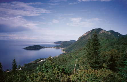 Paysage maritime – Saint-Fabien, Bas St-Laurent (Québec, Canada)